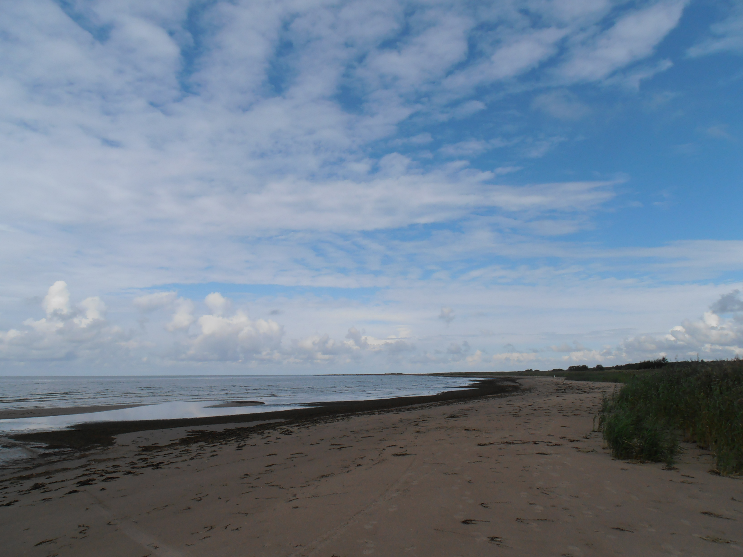 Strand von Ainaži